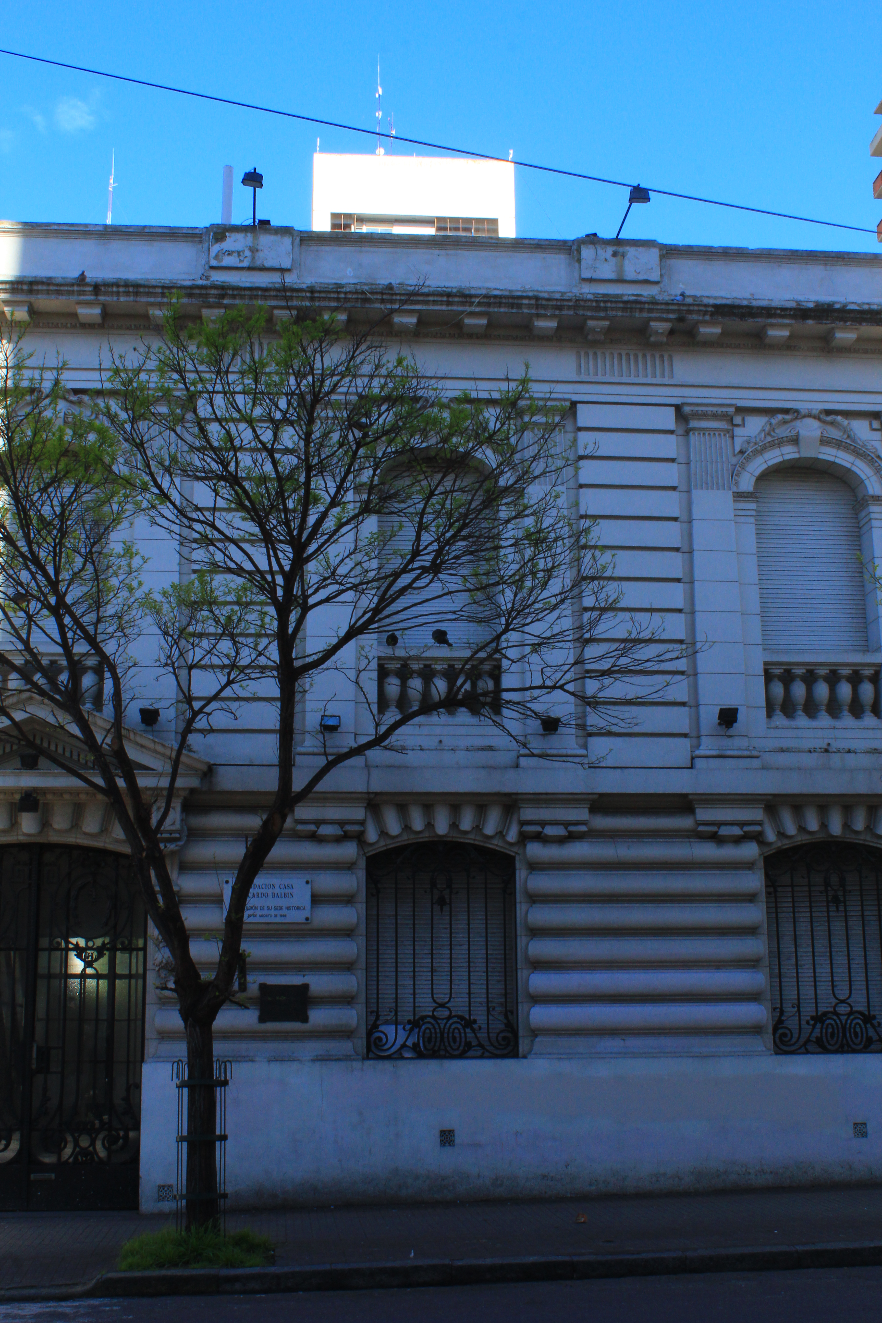 Casa de Ricardo Balbín en La Plata (Argentina).